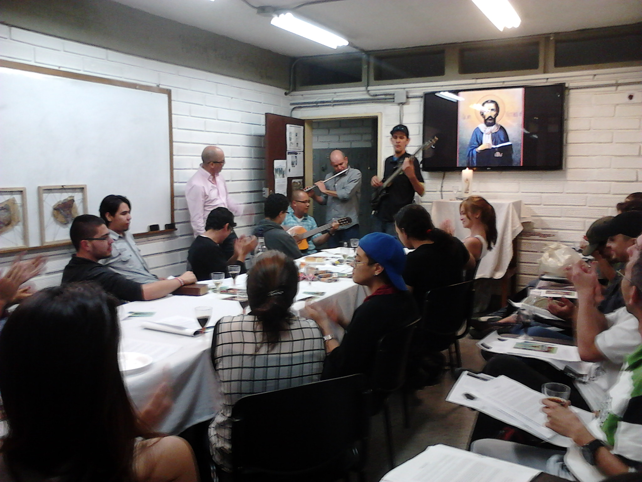 Celebración del día de San Justino. Patrono de los filósofos. Las clases de Carlos Enrique se convertían en ágapes, en compartir la palabra, como lo hacían los primeros cristianos